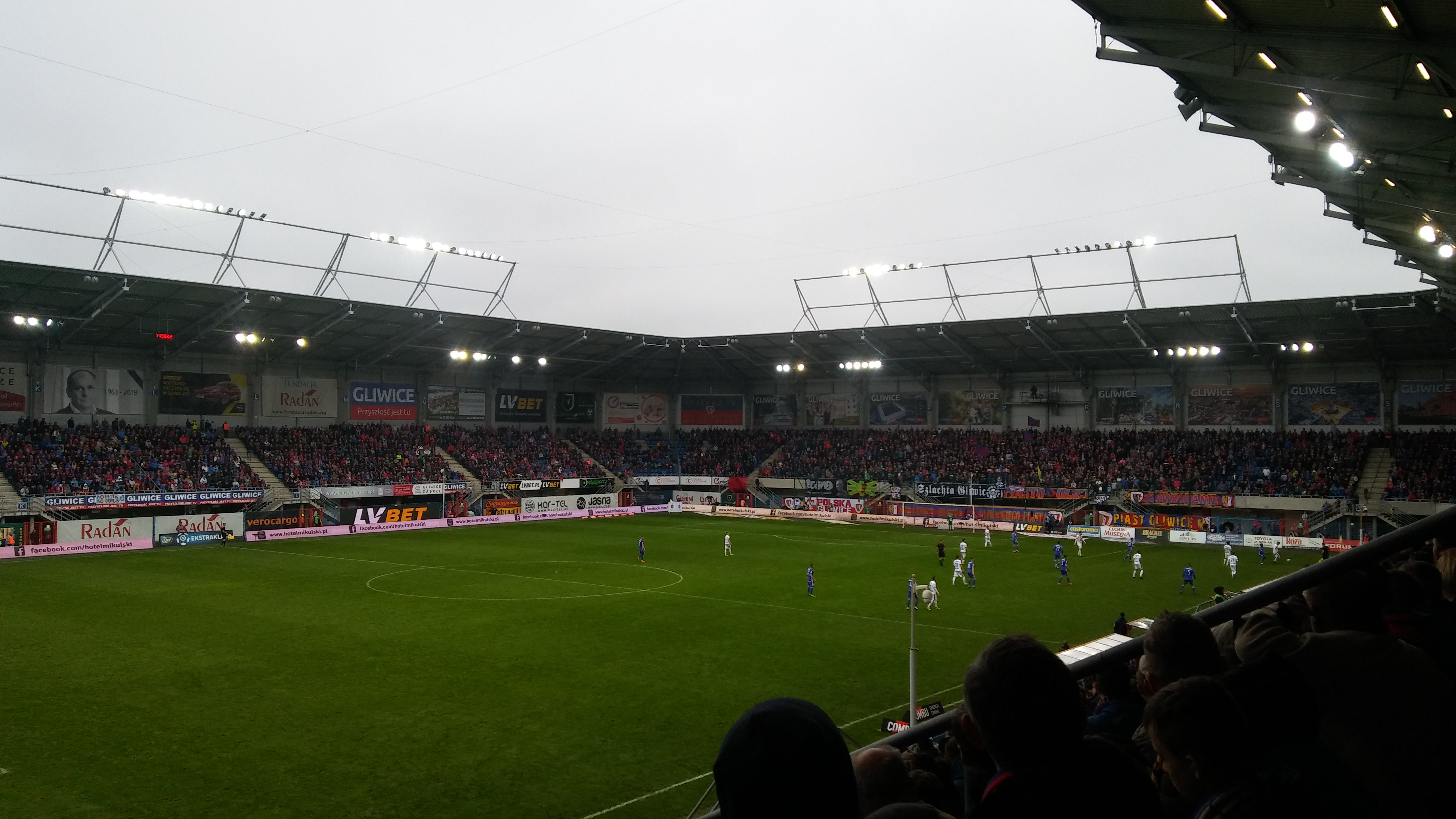 Piast Gliwice - Jagiellonia Białystok 12.05.2019